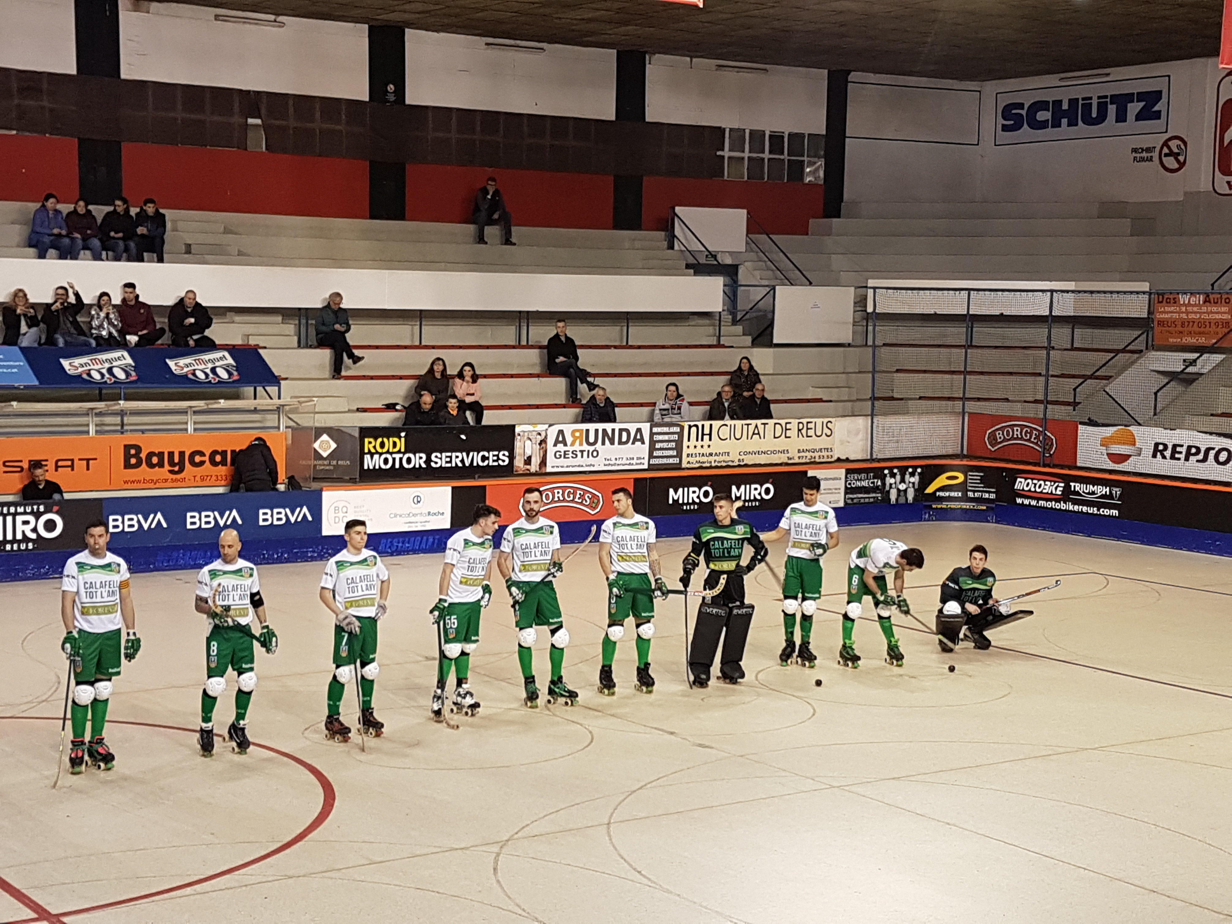 Plantilla Club Patí Calafell